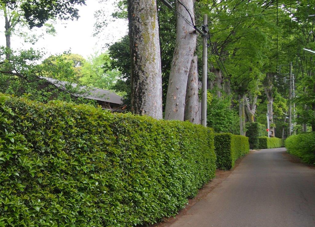 屋敷林と生垣（東久留米市柳窪）